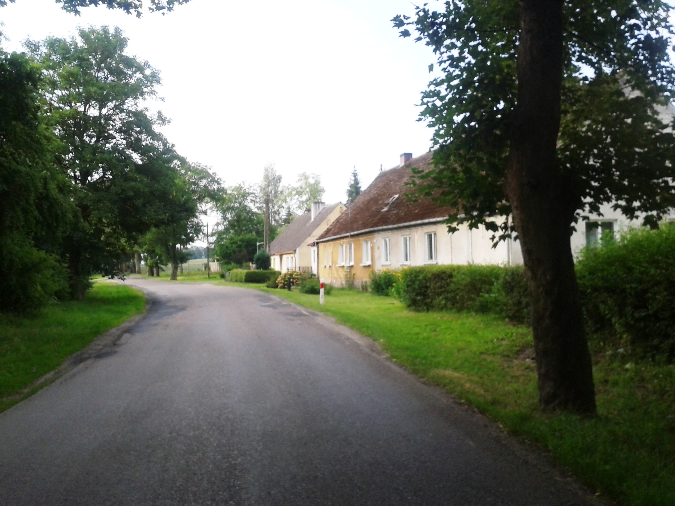 Buczyna - gmina Świdwin